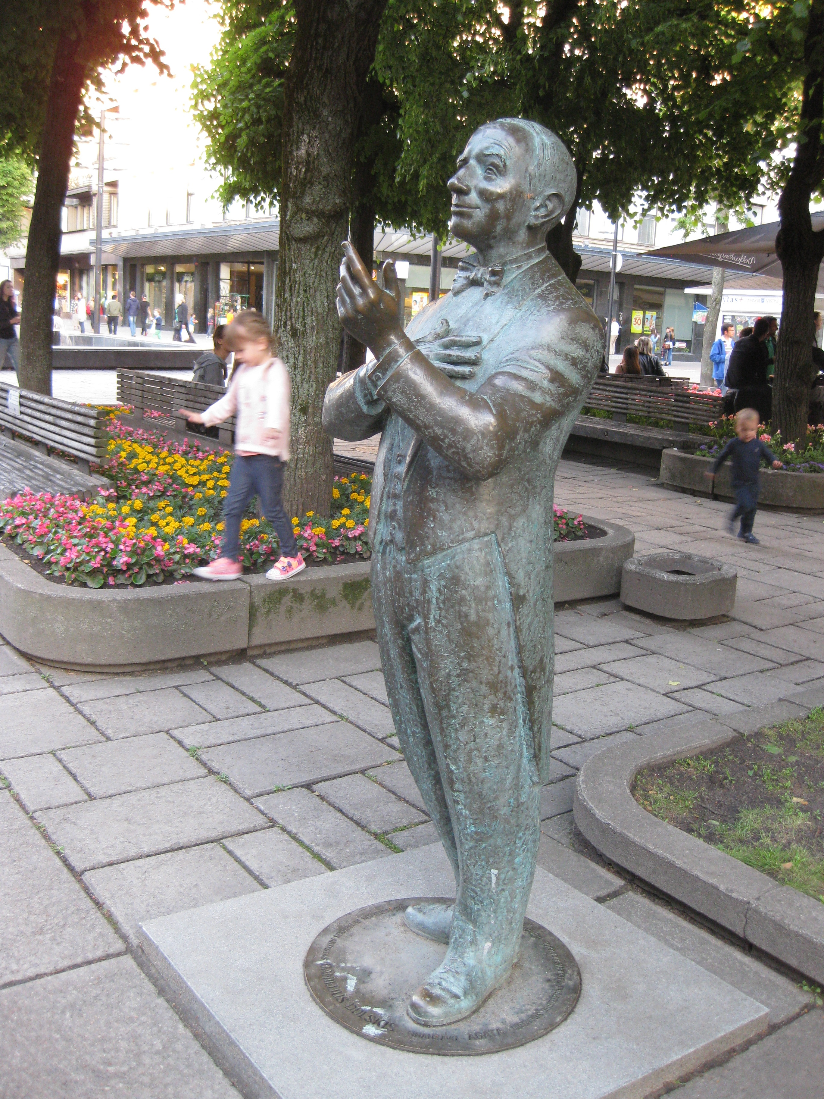 Litwakischer Sänger; Denkmal seit 2007 vor dem Restaurant "Metropolis"